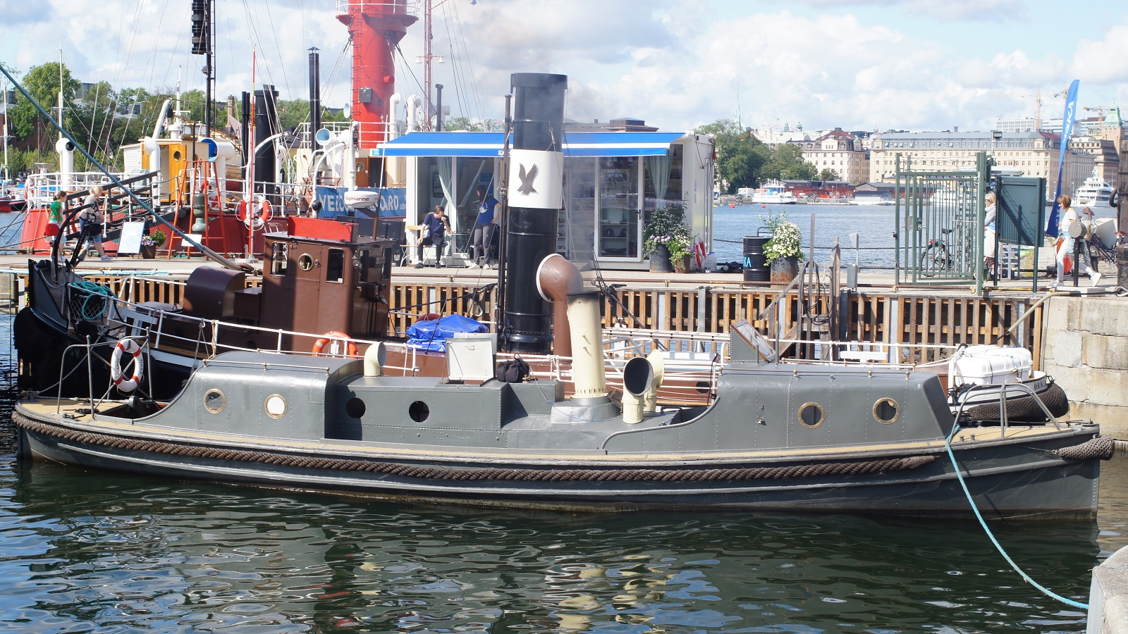 Schwedisches Dampfboot "Ångslup nr 45", Beiboot der HMS Wasa (1901), nach der Restaurierung